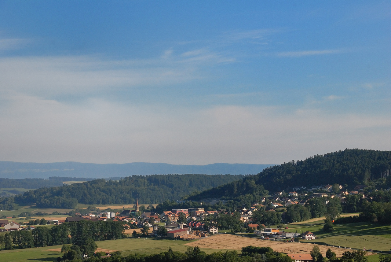 Le village de Ursy se situe dans le canton de Fribourg en Suisse à environ 25 km de Lausanne